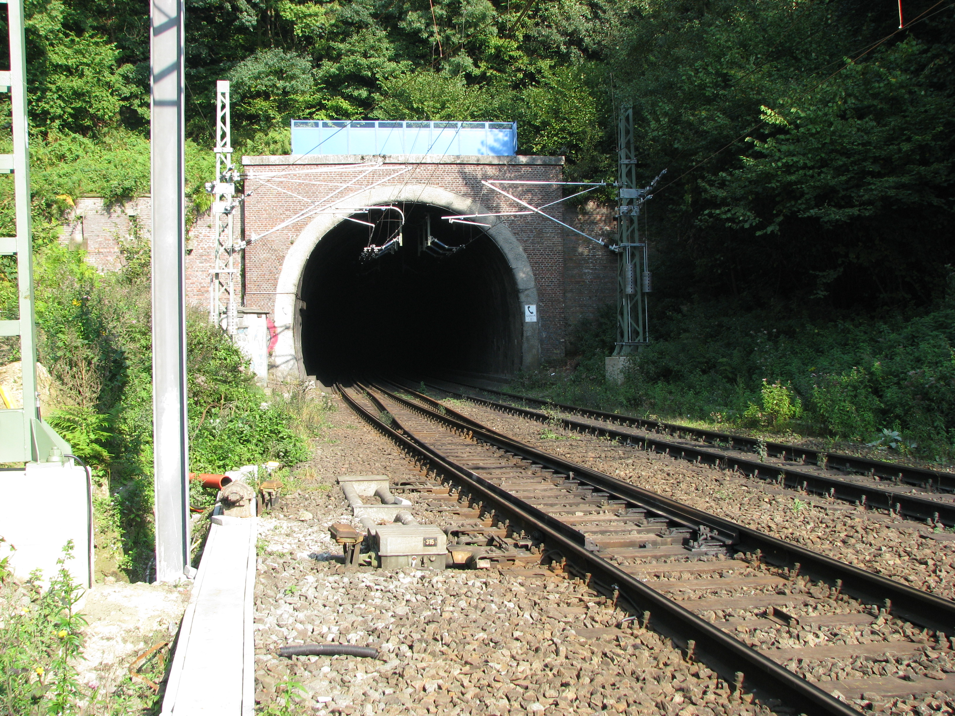 Das Westportal des Gemmenicher Tunnel zwischen Belgien und Deutschland auf der Montzenroute von Tongeren nach Aachen West.